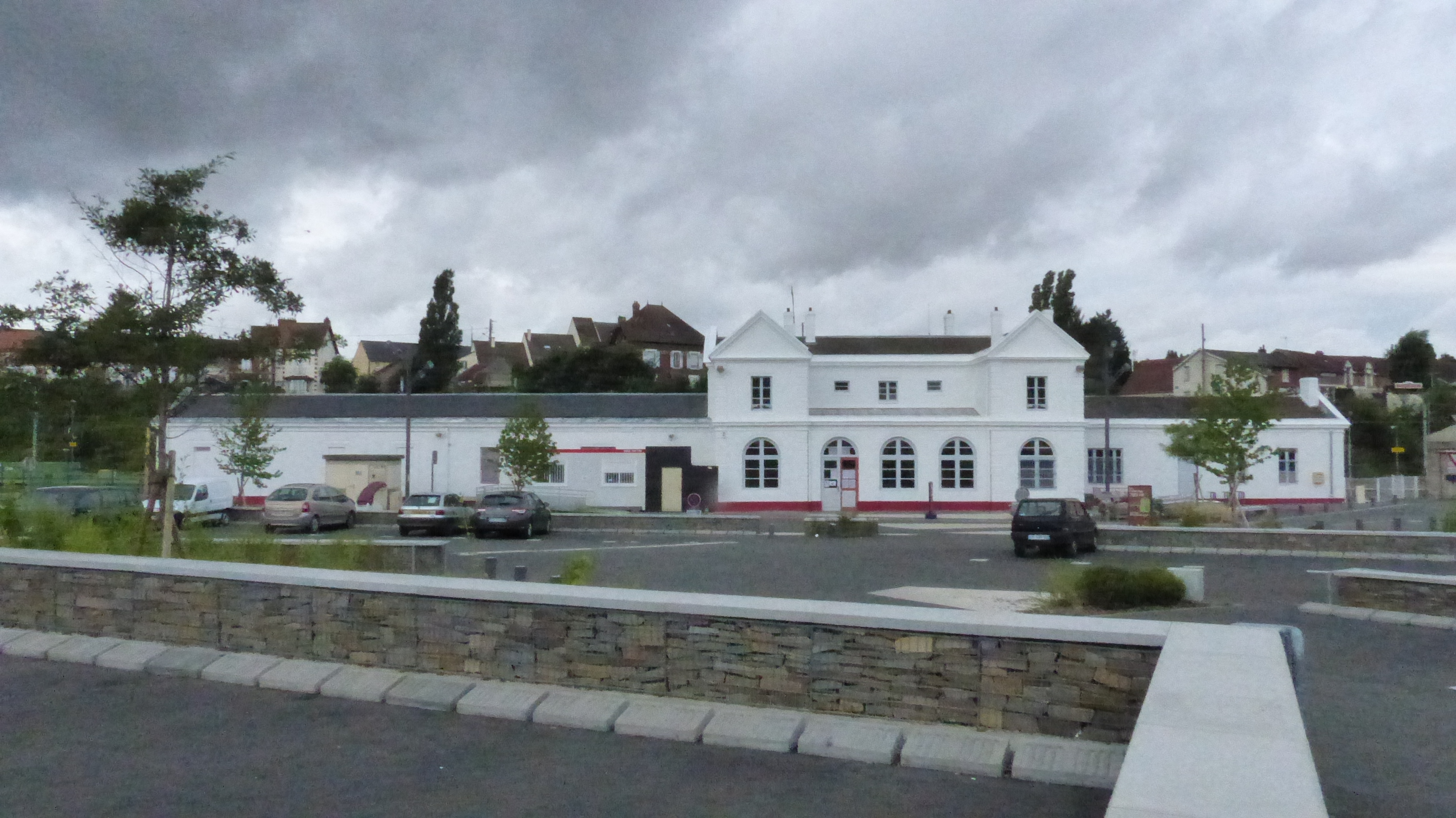 Bâtiment voyageur de la gare de Saint-Just-en-Chaussée